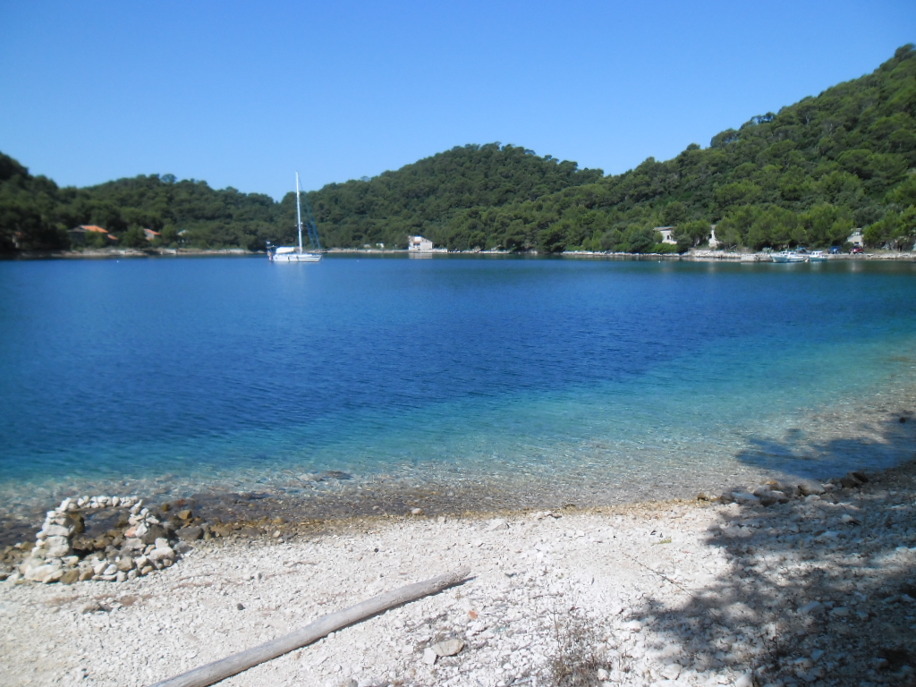 otok Lastovo